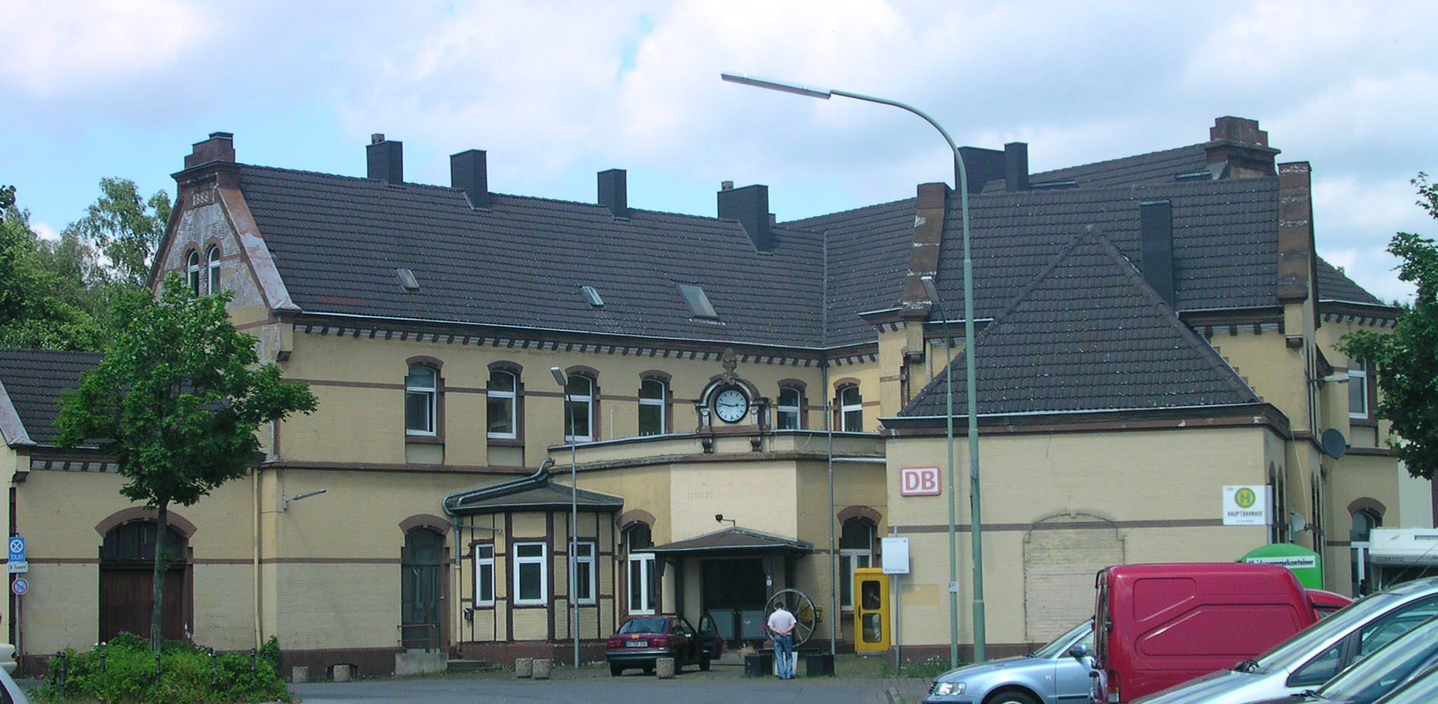 Stolberg, Hauptbahnhof. (Bis zum Umbau in 2014)